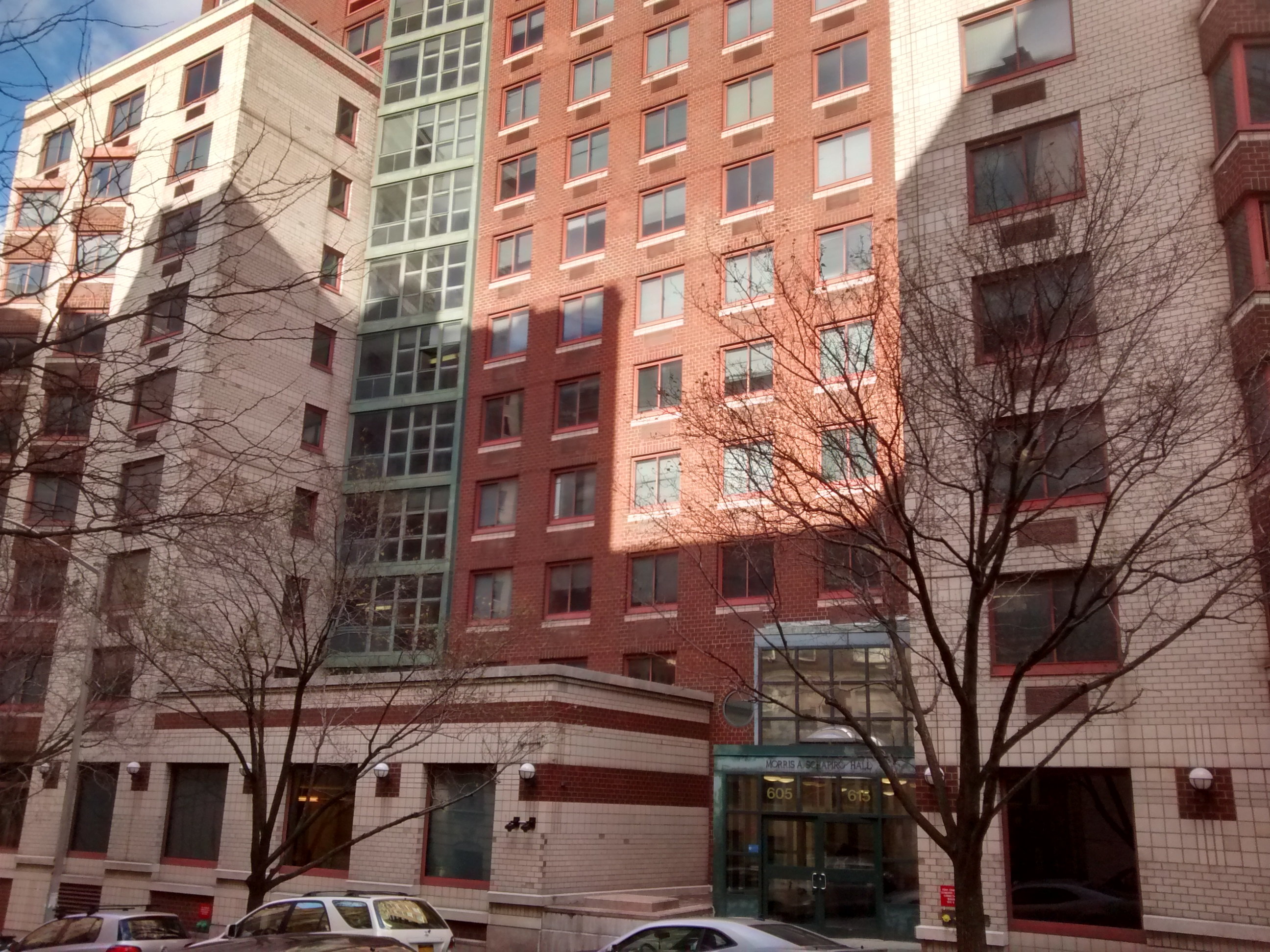 Schapiro Hall